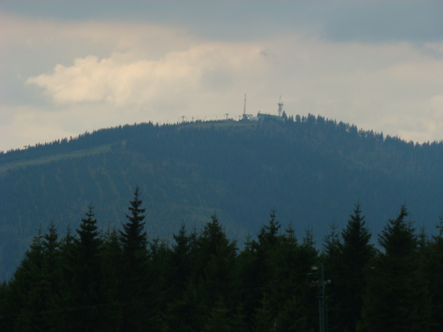 Krkonošská tisícovka Medvědín (1235 m.n.m.) vyfocená od Erlebachových bud (1150 m.n.m.)